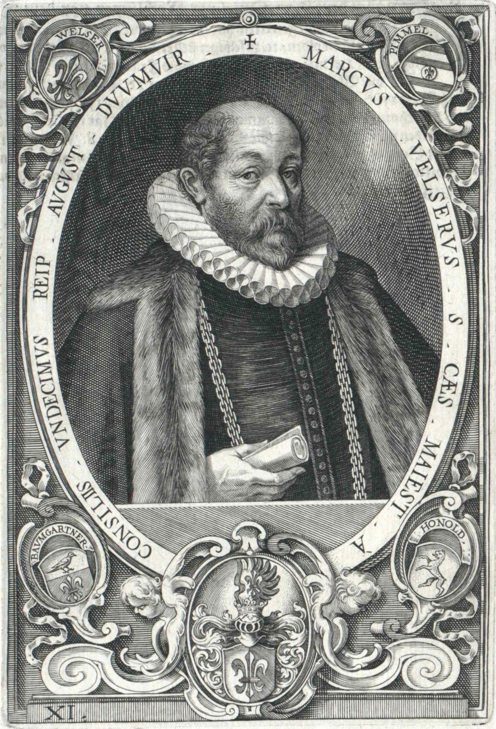 Markus Welser (1558–1614), Kupferstich 19 x 13 Centimeter, Umschrift: „Marcus Velserus S. Cæs. Majest. A. Consiliis, Undecimus Reip. August. Duumvir", in den vier Ecken die Wappen der Welser, Pimmel, Baumgartner und Honold. Nr. XI. in der Sockelleiste.